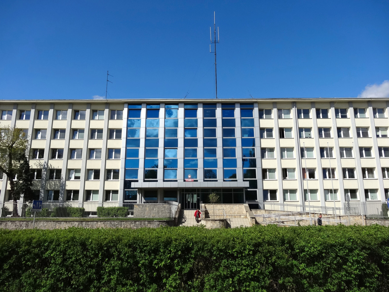 Wojewódzka Komenda Policji w Bydgoszczy przy ul. Powstańców Wielkopolskich